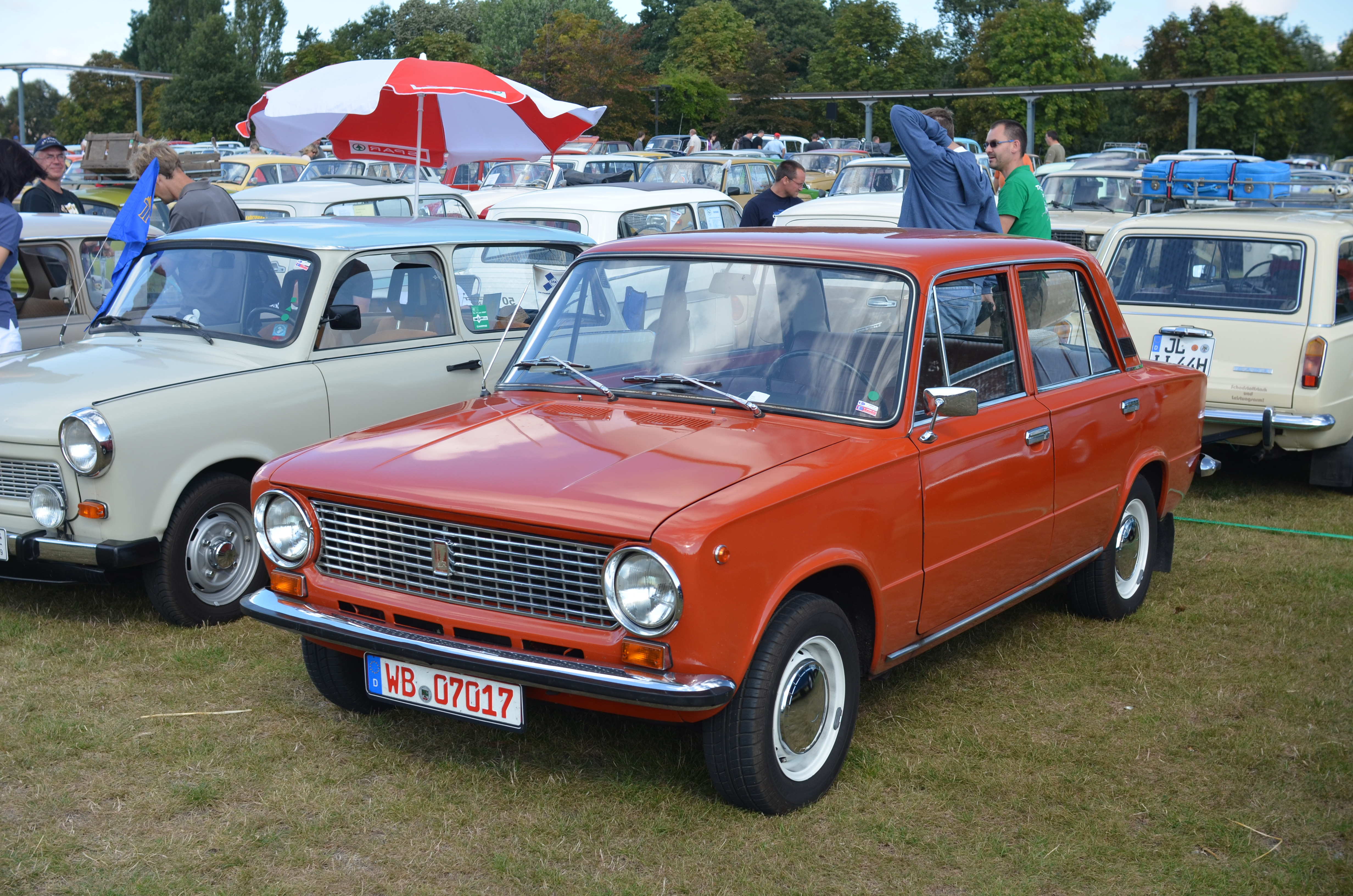 Lada